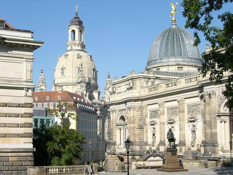 Dresden Frauenkirche Semperdenkmal Kunstakademie